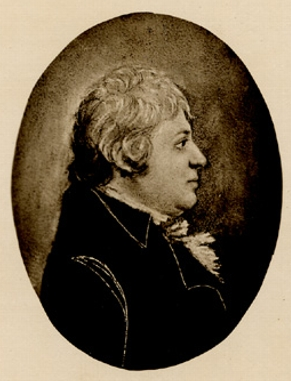 Jean-Baptiste-Olivier Perrault